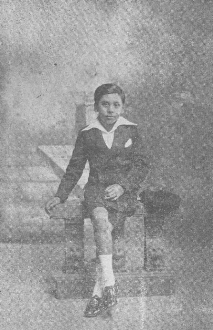 Colaboradores de la «Hora del Abuelito» (Programa que era transmitido por CE 78 Radio Hucke de Santiago de Chile.) VICENTE BIANCHI ALARCON. el inteligente niño-pianista Director de la Orquesta infantil «El Abuelito». Vicente Bianchi Alarcón (Ñuñoa, Región Metropolitana de Santiago; 27 de enero de 1920-24 de septiembre de 20181​) fue un destacado compositor, pianista y director de orquesta y coros y radiodifusor chileno. Obtuvo el Premio Nacional de Artes Musicales de Chile en 2016. Su obra destaca por llevar a la música los poemas de Pablo Neruda, la musicalización de misas y eventos litúrgicos, como la Misa a la chilena (compuesta en 1964 y estrenada en 1965) y el Te Deum (1970-2000), arreglos orquestales, como Música para la historia de Chile y Canto a Bernardo O’Higgins, y arreglos para películas, entre otras.